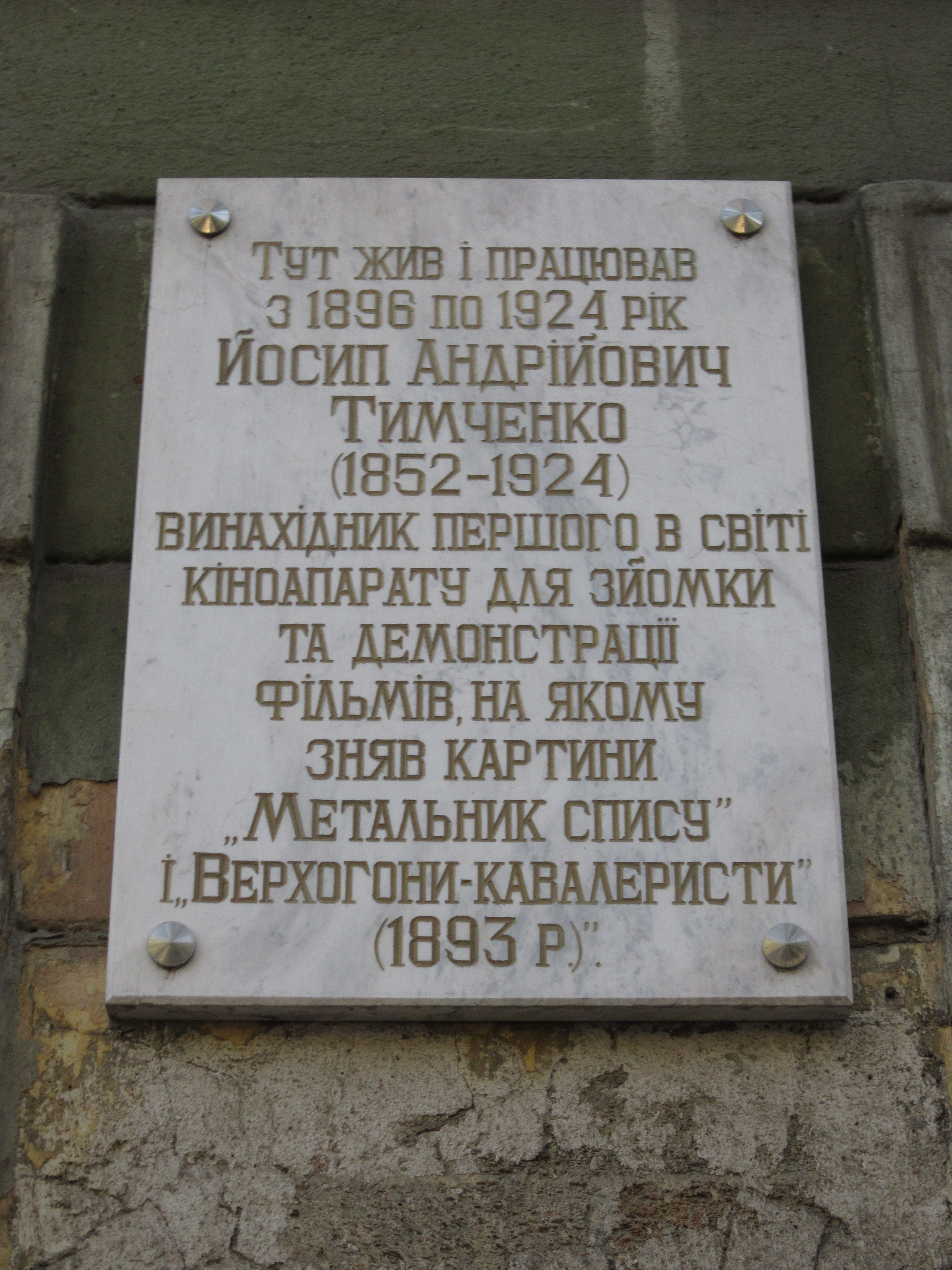 Будинок Тимченка, в якому жили:- Л.С. Ценковський - ботанік і бактеріолог, член-кор. Петербургської АН;- М.М. Соколов - хімік, академік;- Д.М. Абашев - агроном і агрохімік, професор, Одеса, Преображенська вул., 20/24 (лівоворотня споруда)